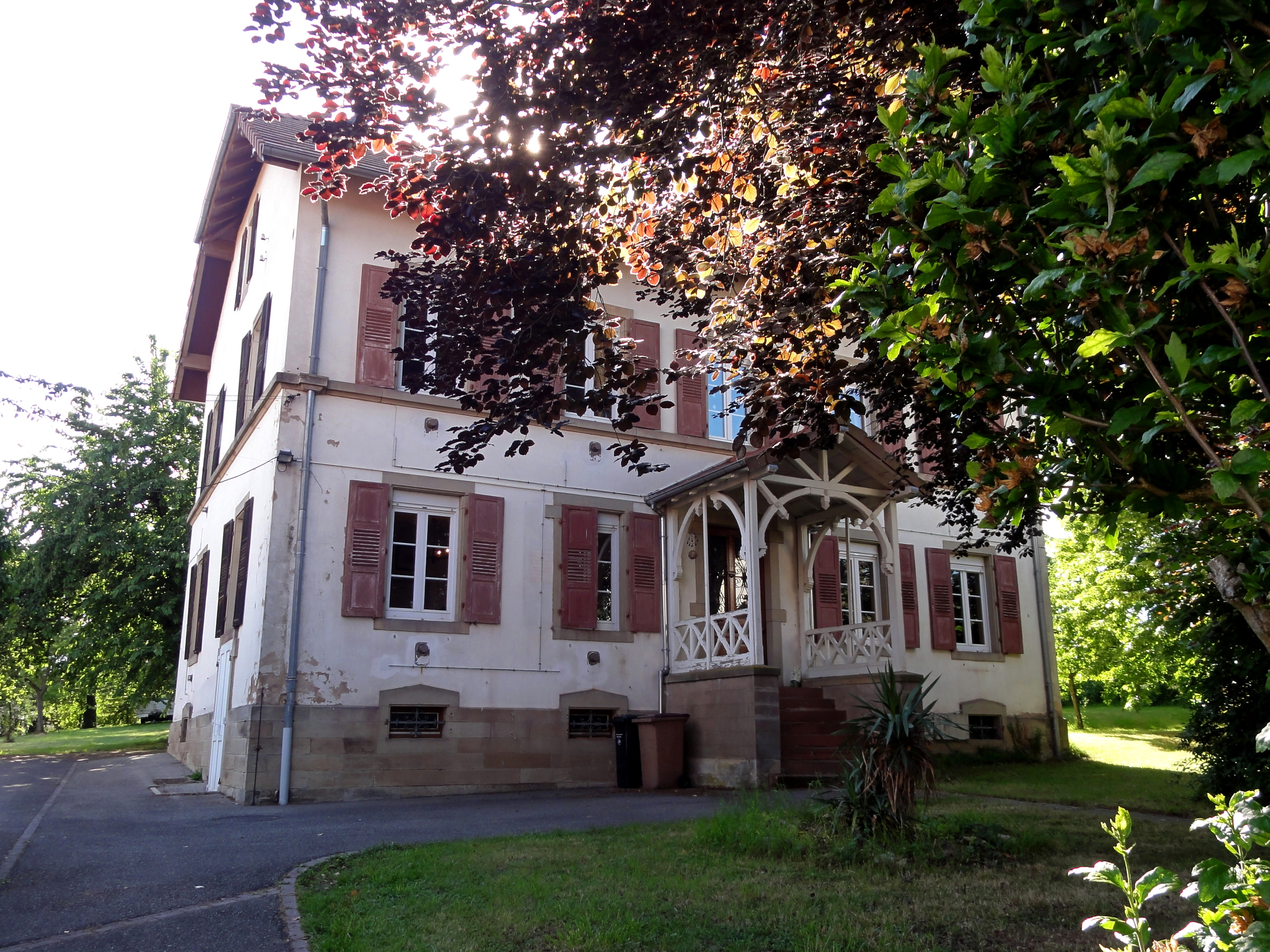 Alsace, Bas-Rhin, Alteckendorf, Presbytère, rue de l'Eglise.